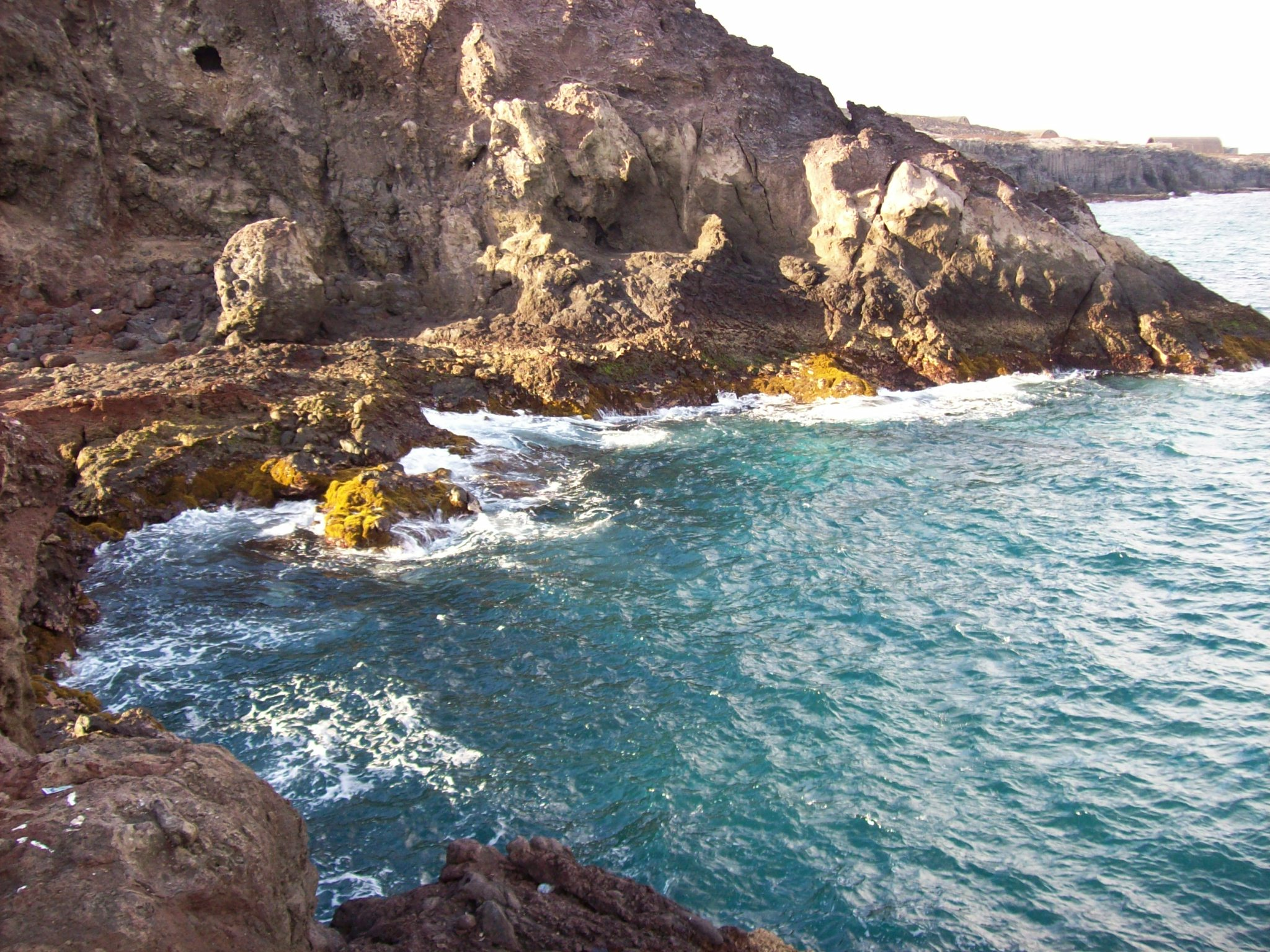 La marfea vista desde El Roque